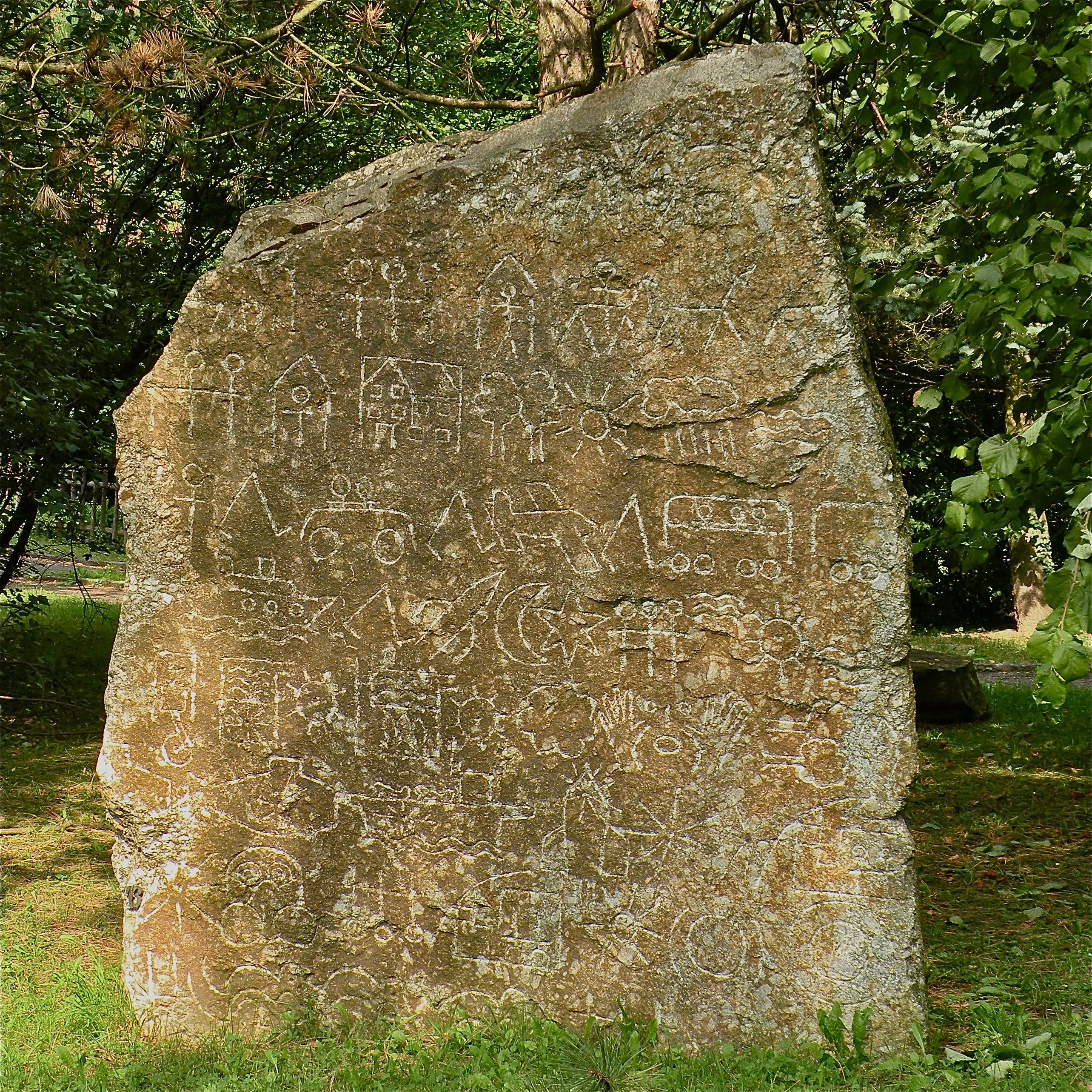 Piktographische Auszüge aus der Menscheitsgeschichte von den Anfängen bis zur Selbstzerstörung